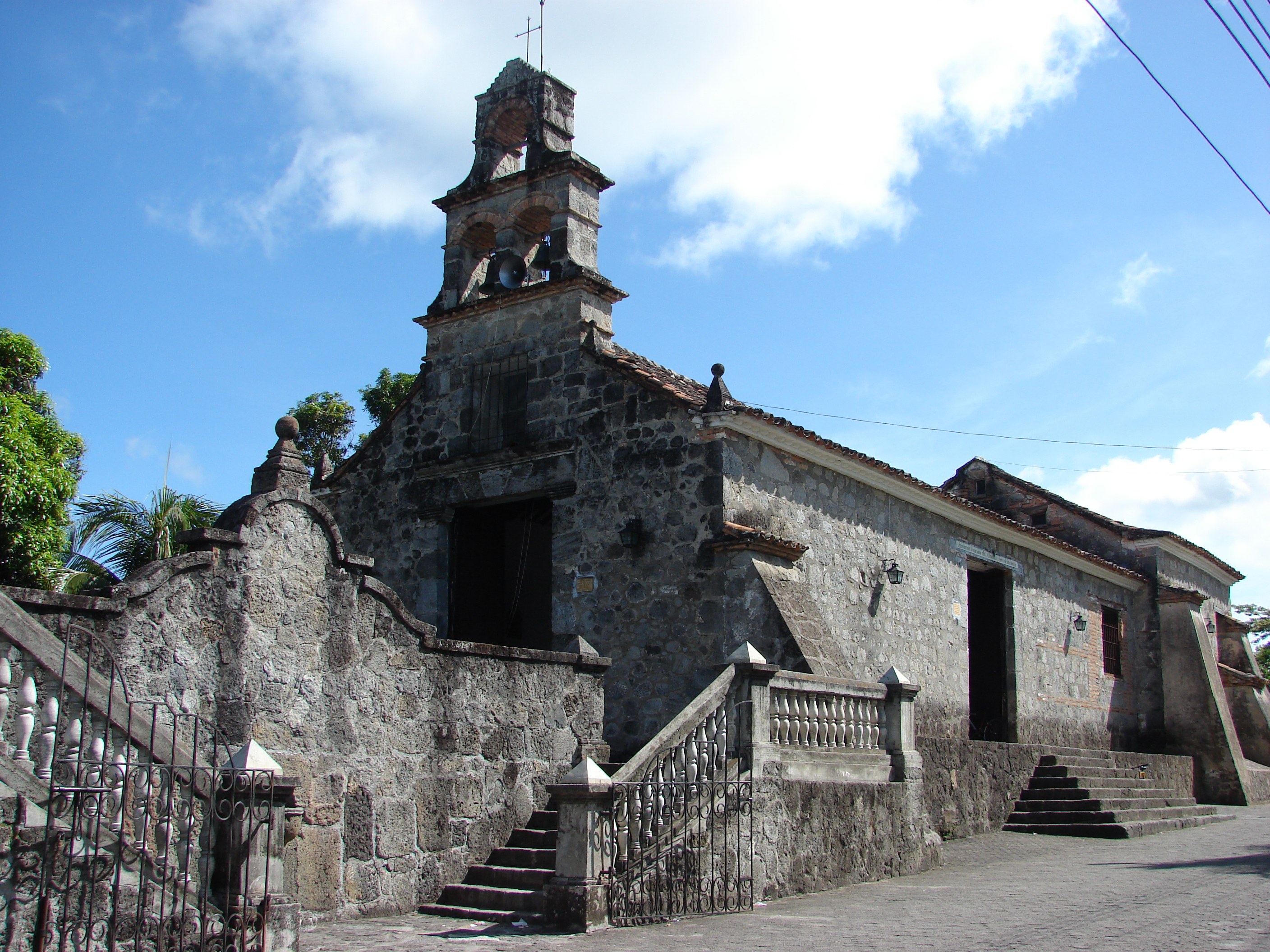 Iglesia de la Ermita. Sector histórico Mariquita-Tolima. A Pulido-Villamarín.